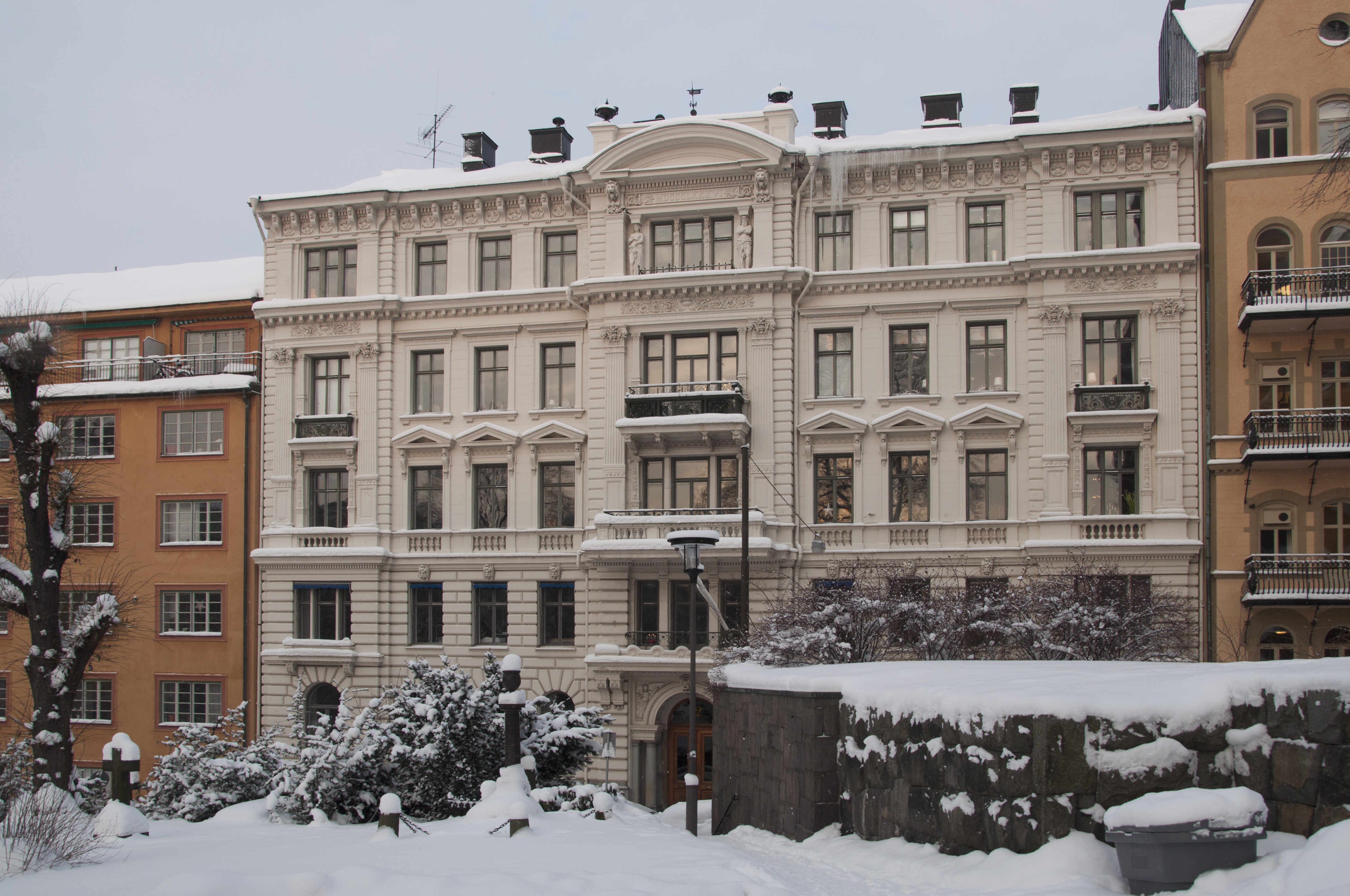 Kammakargatan 12 (fastigheten Hägerberget 56), S:t Johannes församlings tidigare församlingshus. Byggnadsår 1884-86, arkitekt Gustaf Sjöberg, byggherre C Jehander, byggmästare G Sjöberg.